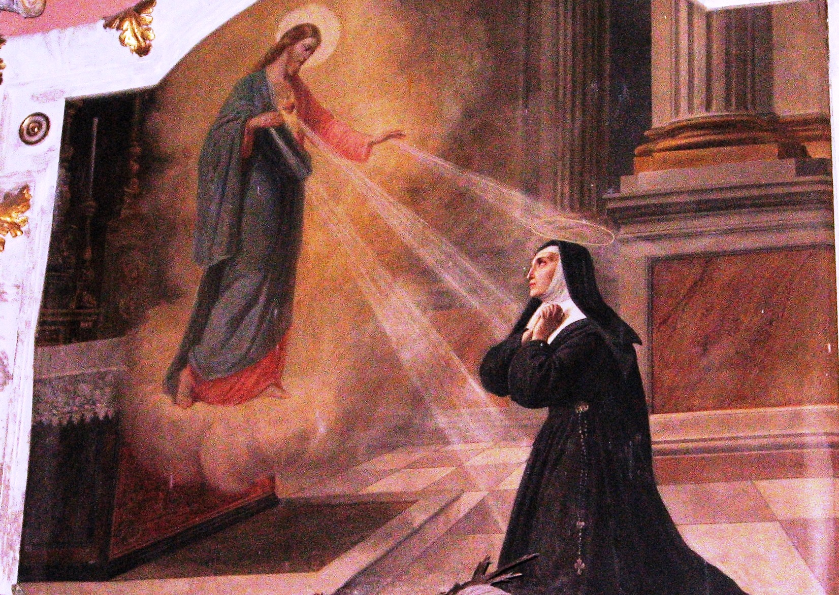 Cortemilia. Chiesa Parrocchiale di San Michele. Rodolfo Morgari: Santa Margherita Maria Alacoque e la devozione al Sacro Cuore.